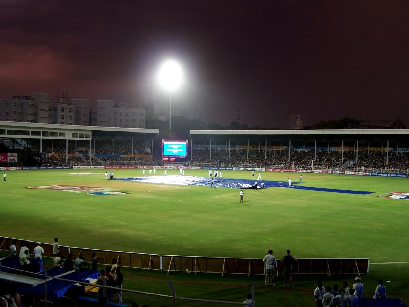 Brabourne Stadium, Mumbai, India.